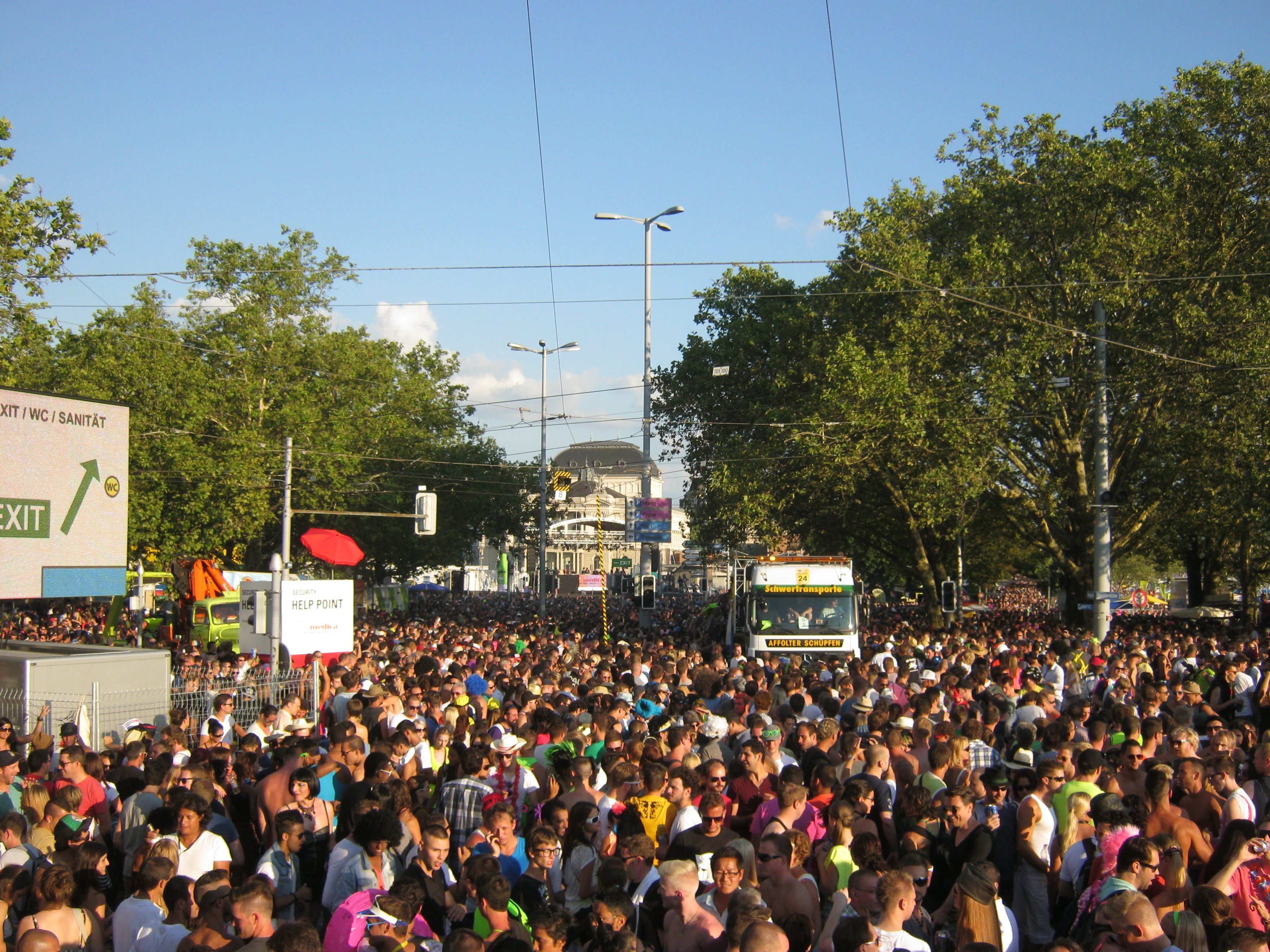 Streetparade 2013